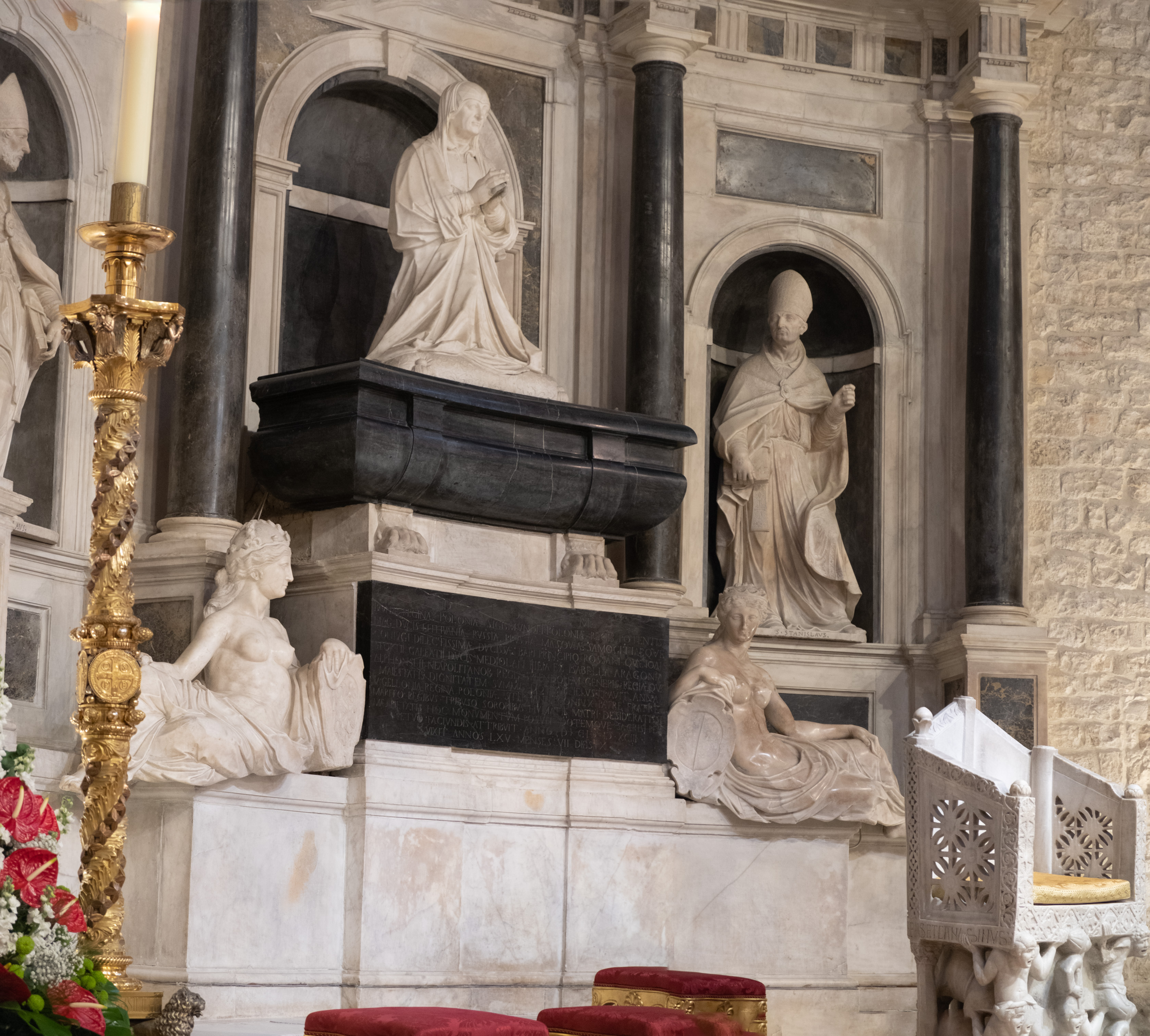 Mauzoleum królowej Bony Sforzy, Bari